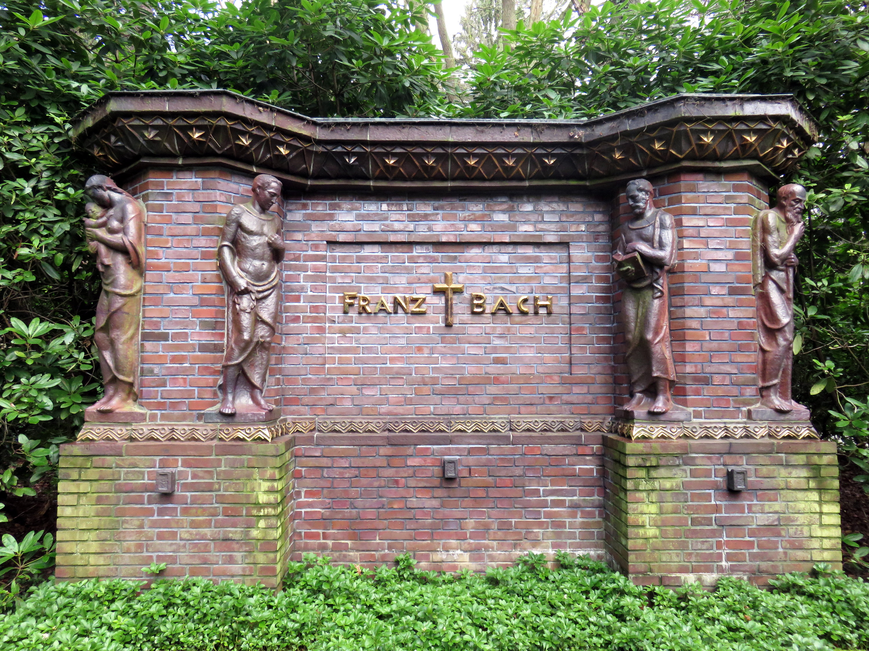 Backstein/Terrakotta-Grabmal von 1935 des deutschen Bildhauers Richard Kuöhl auf dem Hamburger Friedhof Ohlsdorf, Planquadrat Q 25, für den deutschen Architekten Franz Bach.